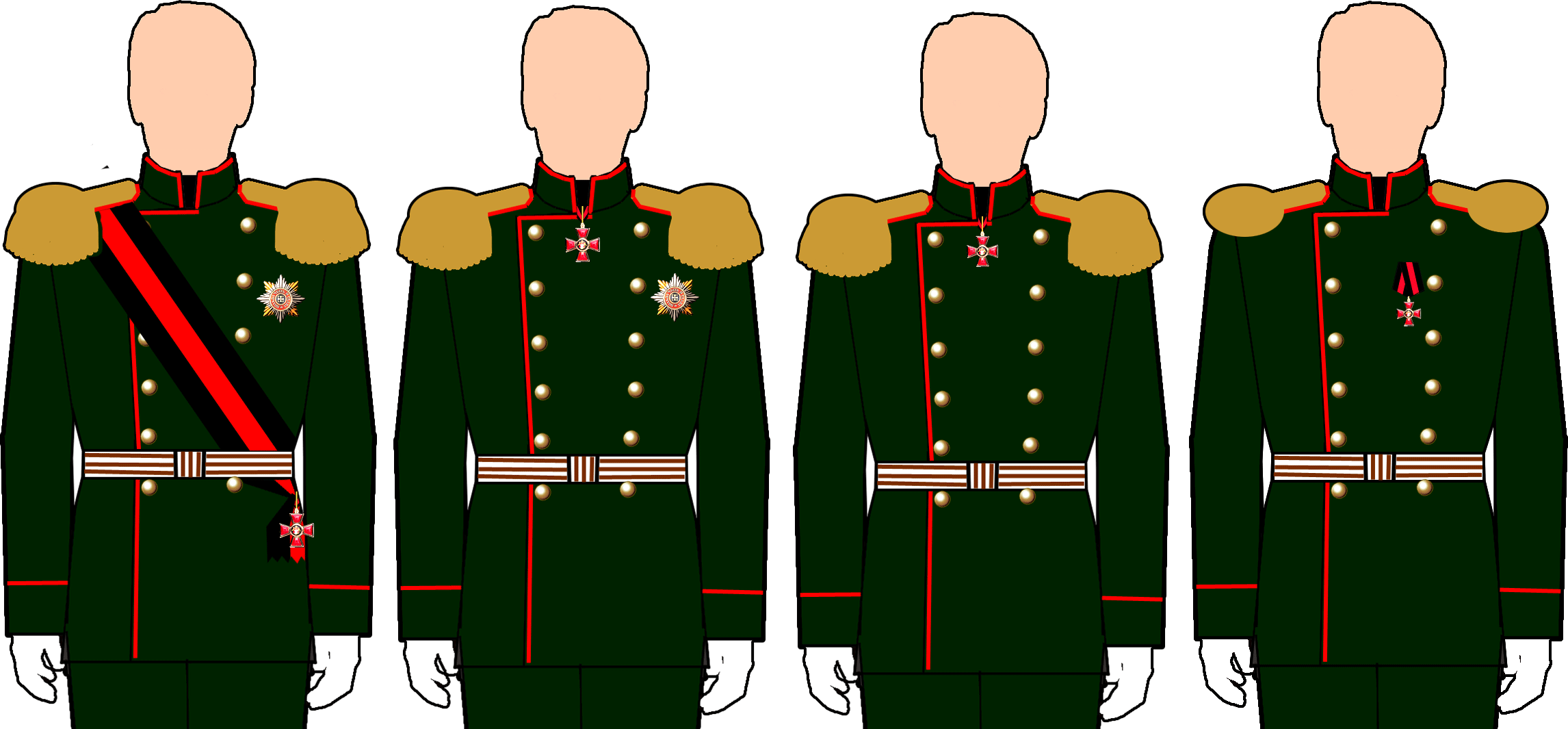 Российская империя Схема размещения орденских знаков ордена Святого Владимира.